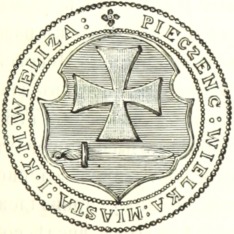 Беларуская (тарашкевіца): Вяліж (Vialiž). Пячаць з гербам места